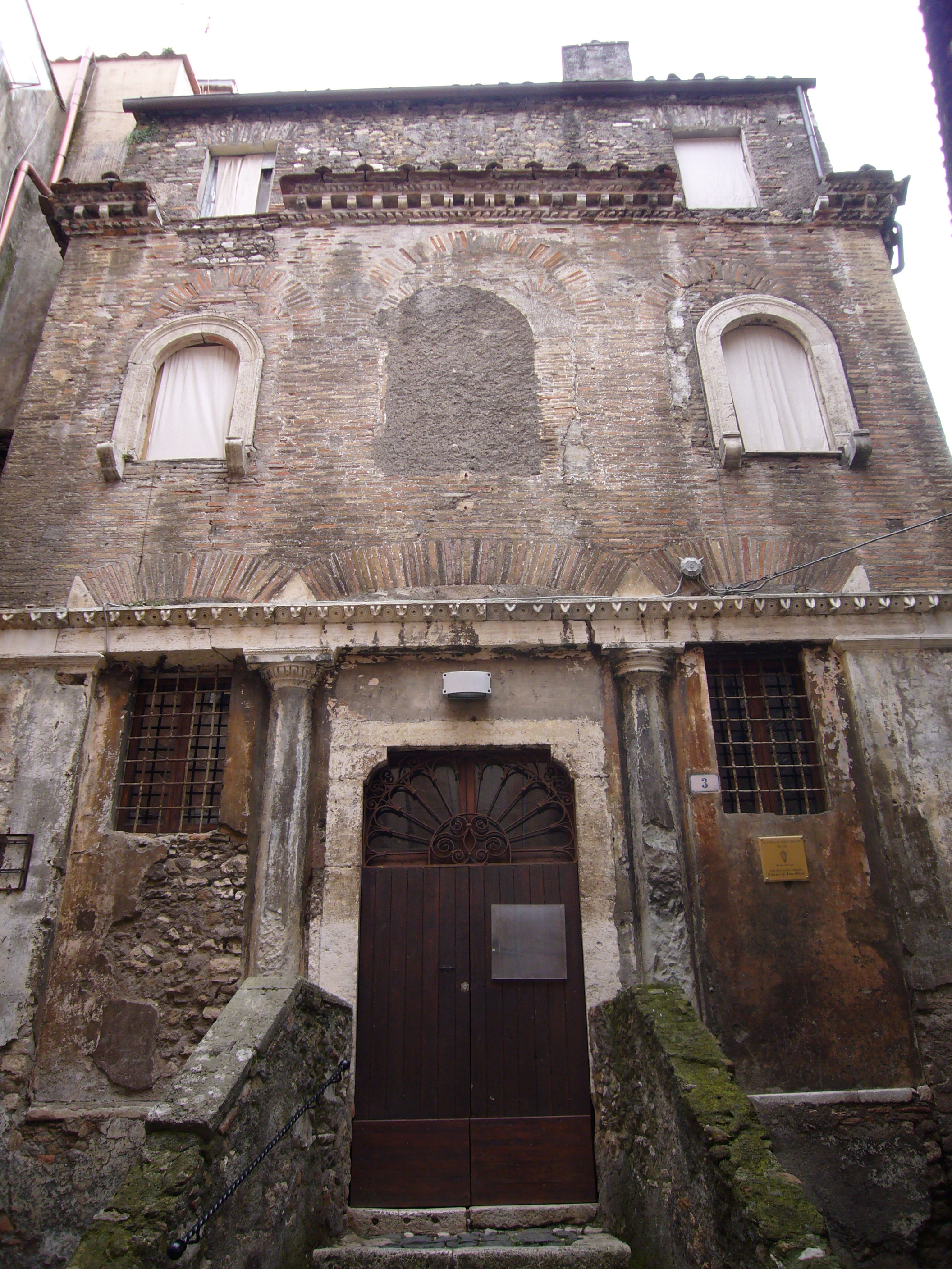 Tivoli, ex chiesa di Santo Stefano ai Ferri (XI-XII. Sconsacrata dal 1840)